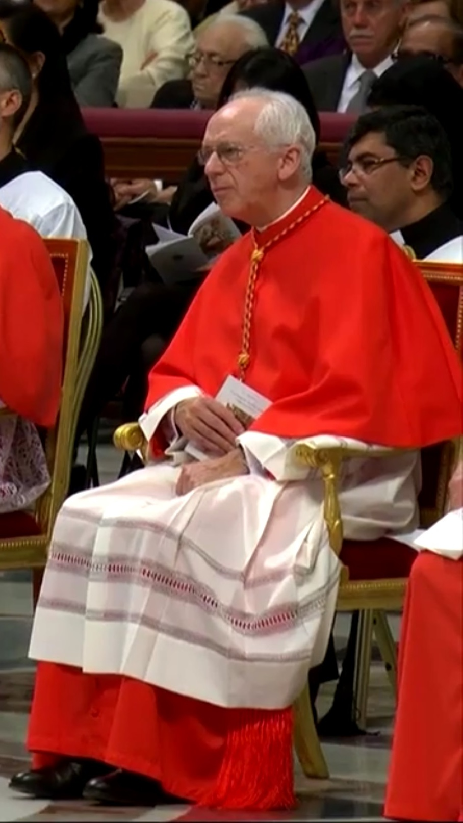 L'archevêque Jozef De Kesel, primat de Belgique, au cours du consistoire ordinaire public du 19 novembre 2016 par le pape François, à l'occasion de sa créations cardinalice.